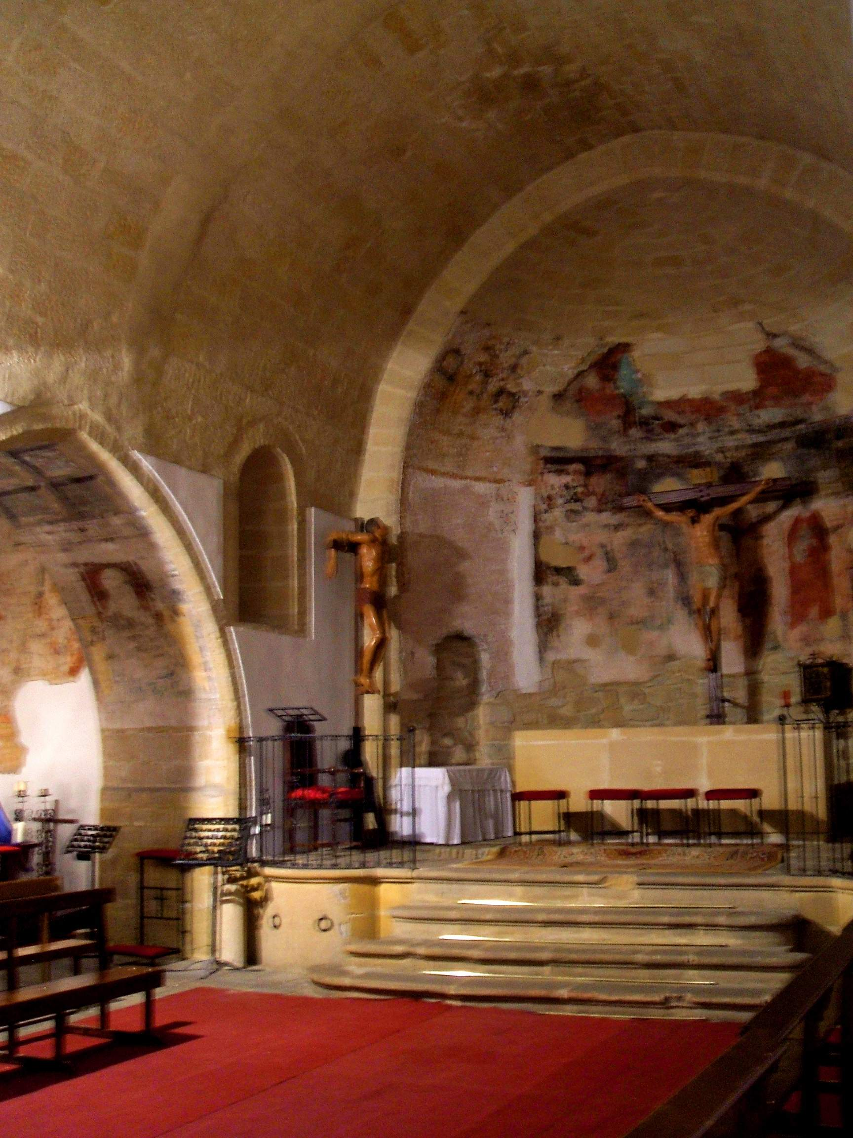 Iglesia de Santa Cruz, en Baeza (Jaén)